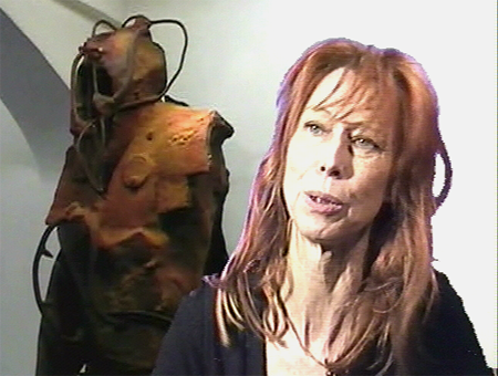 Portrait de Brigitte Terziev